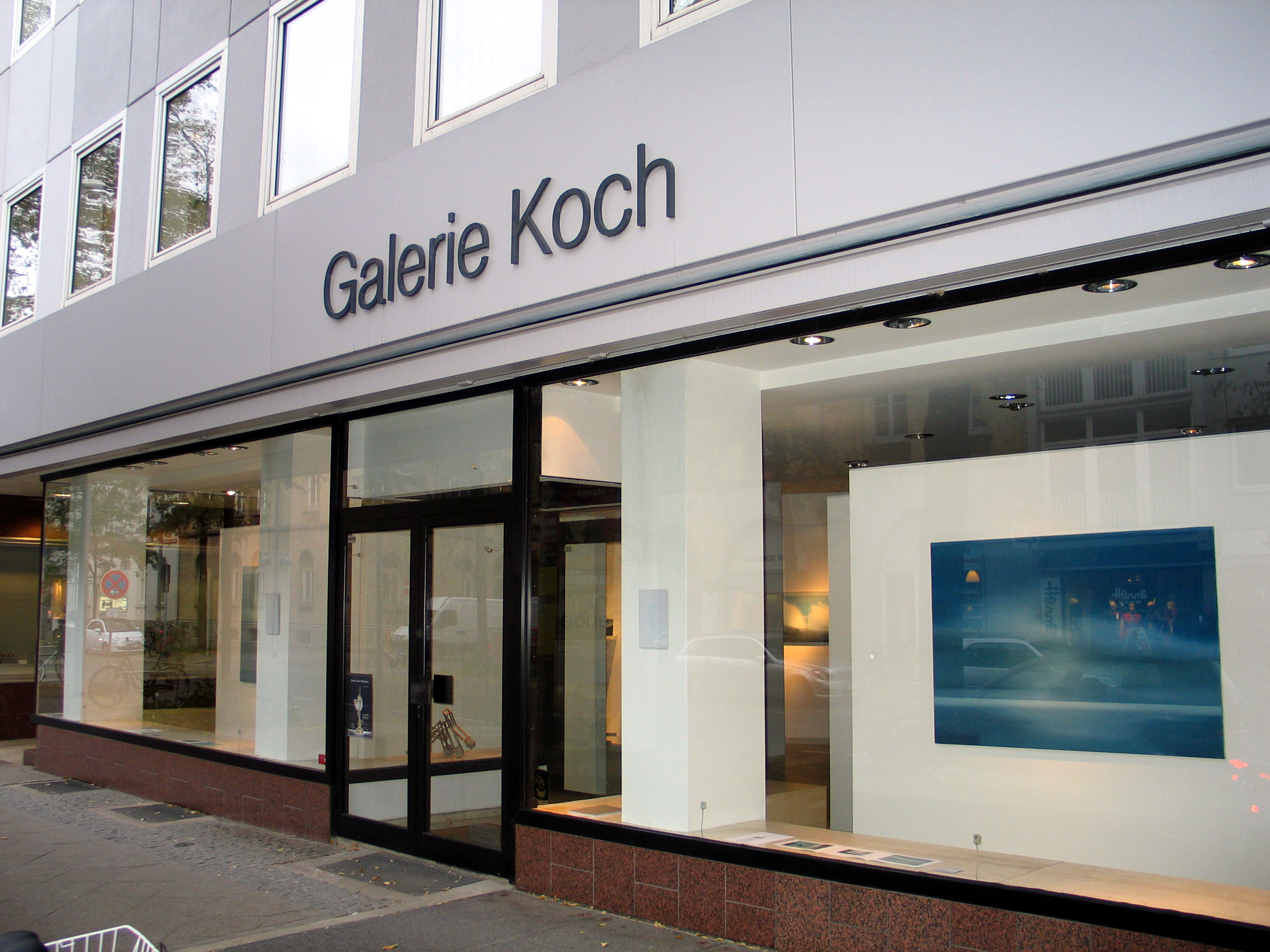 Blick auf die Schaufenster der Galerie Koch in der Königstraße 50 in Hannover ...